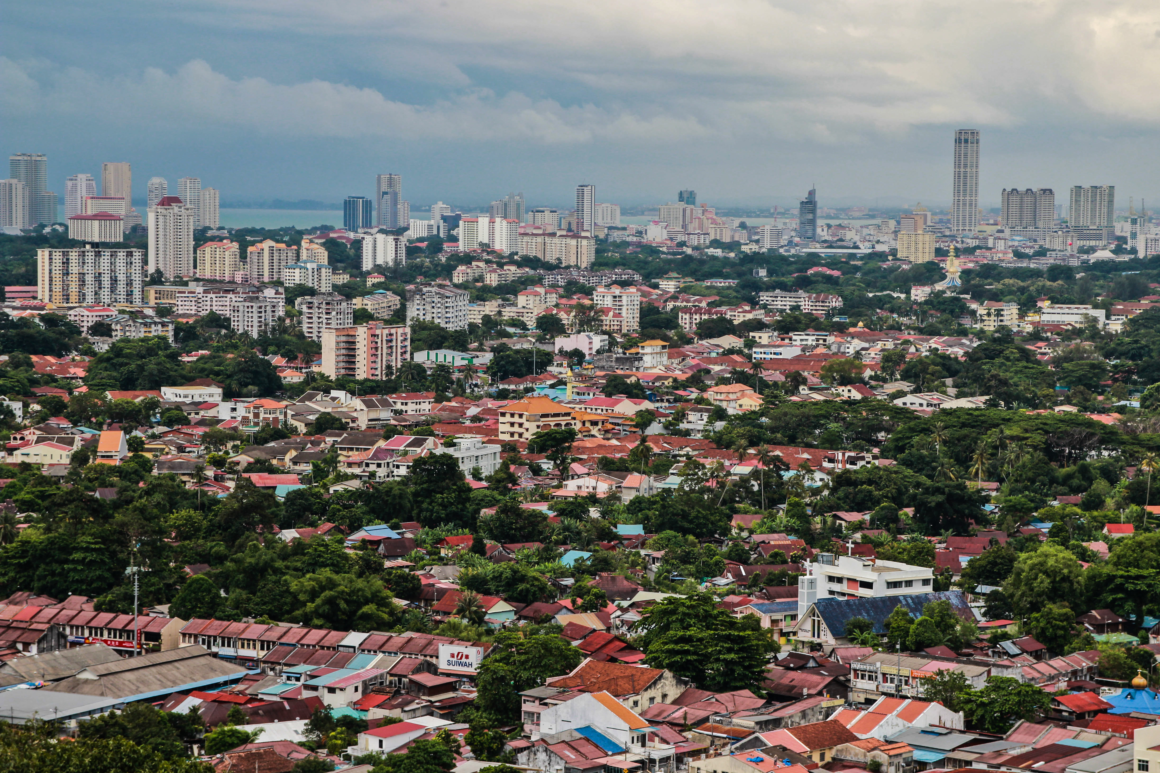 Georgetown